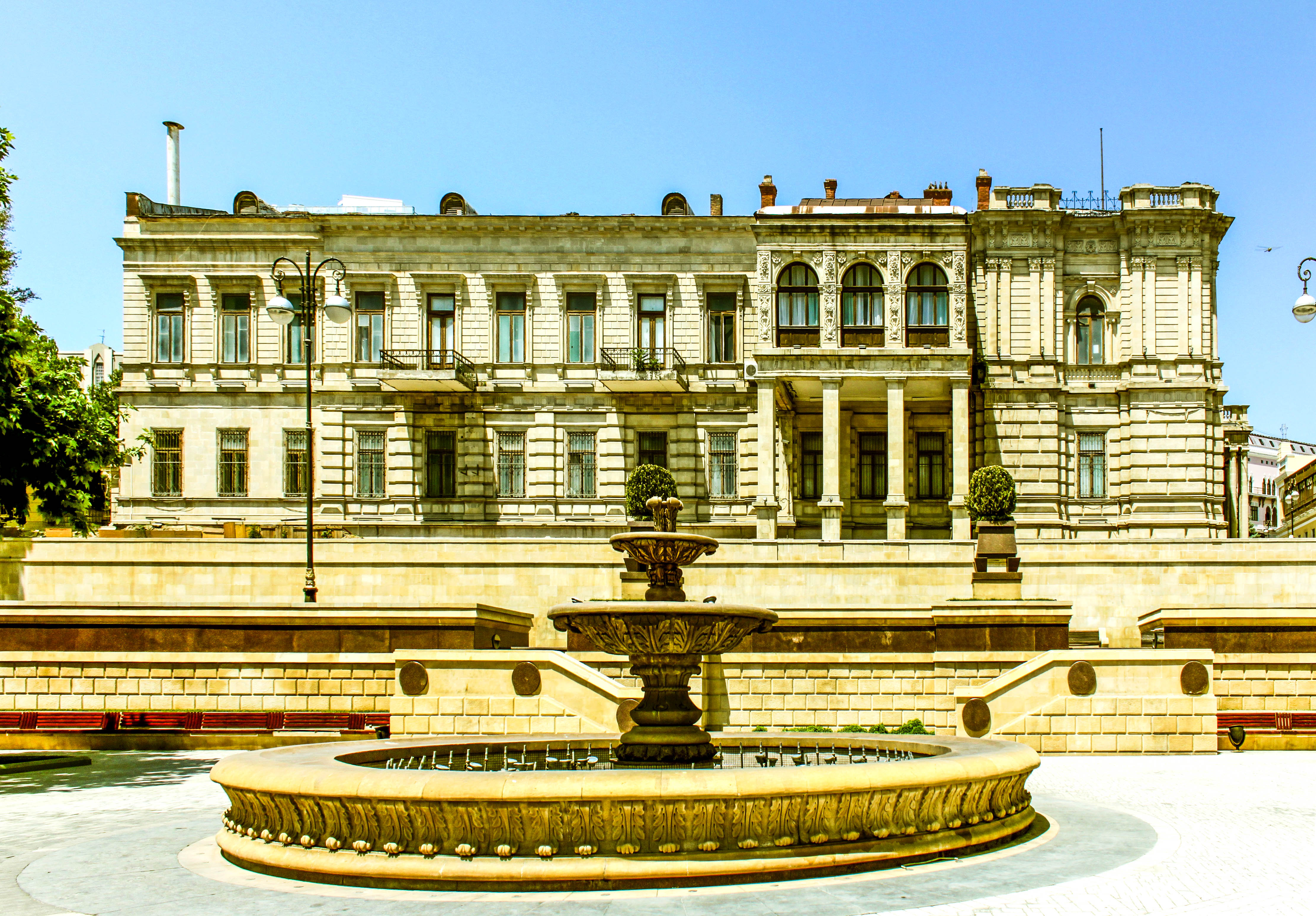 Deburun evi